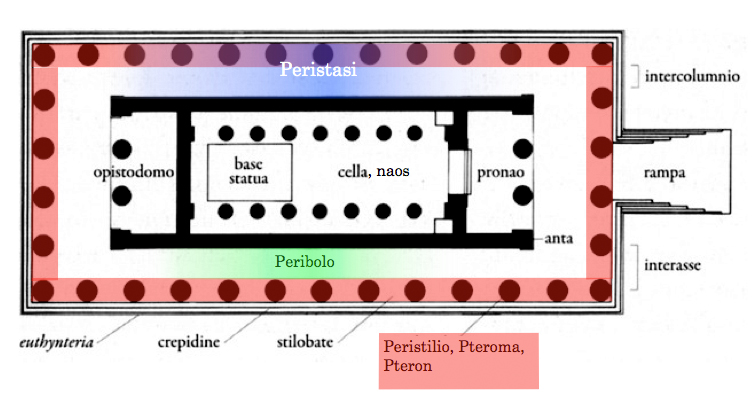 Nomenclatura delle parti del tempio greco